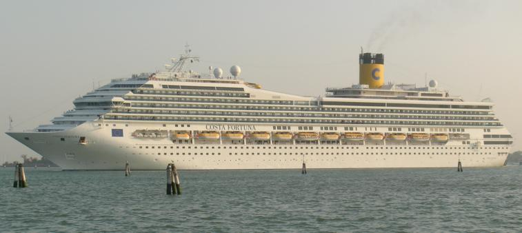 Costa Fortuna, ein Kreuzfahrtschiff von Costa.